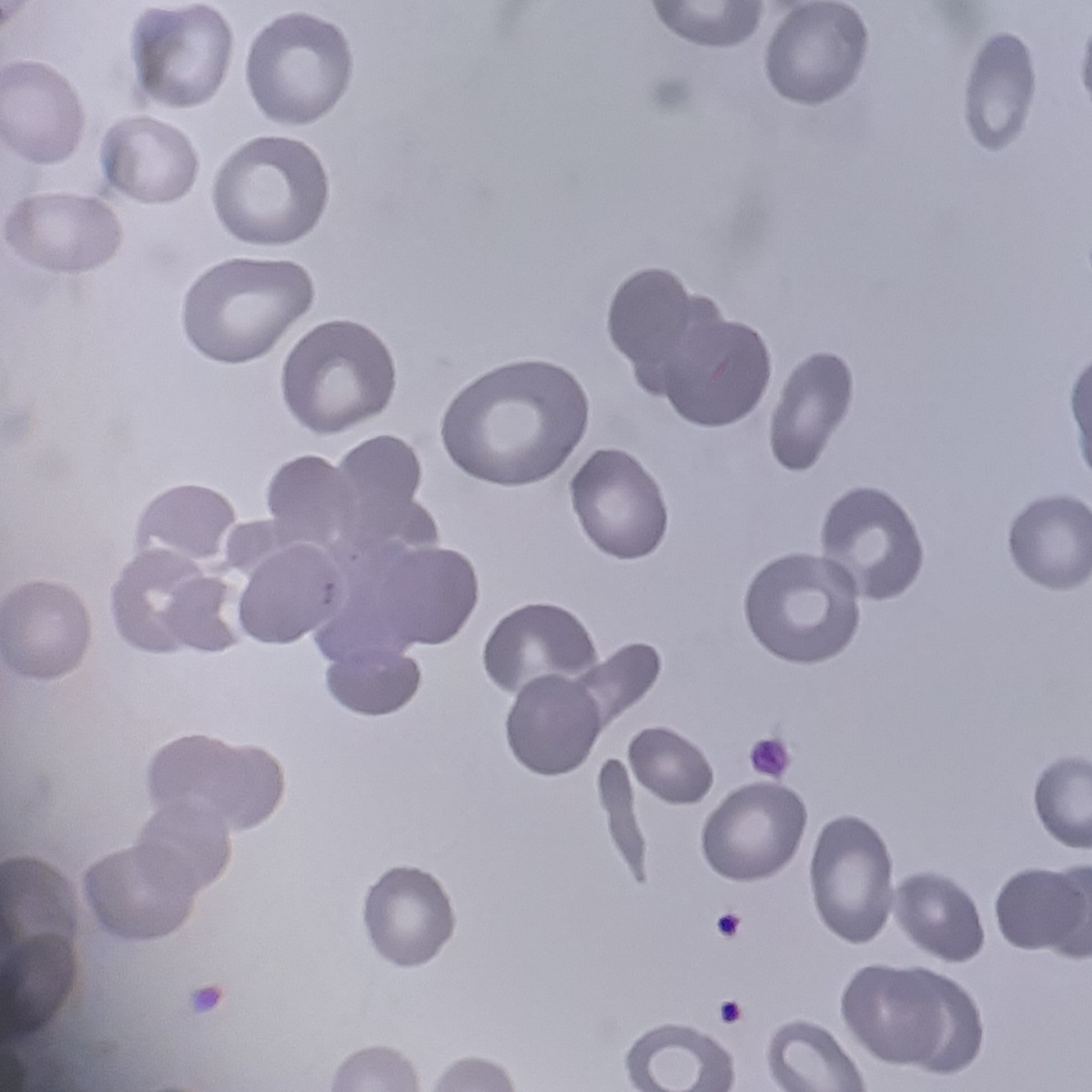 Aglutinación de hematíes por presencia de crioaglutininas